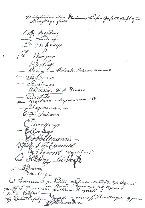 Scan eines Fotos einer Namensliste von 1811 der Menslager Lesegesellschaft